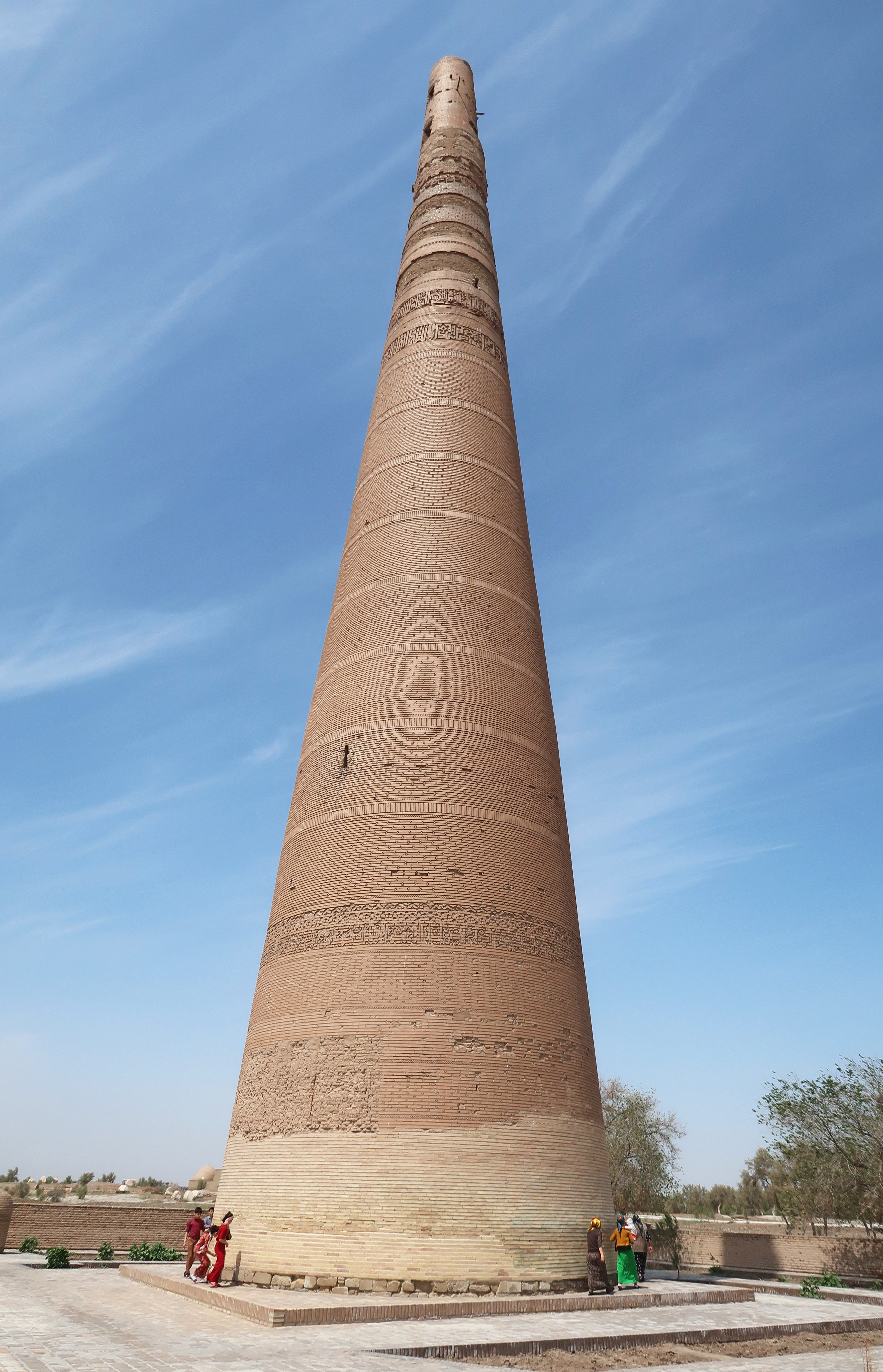 Konye-Urgench, Turkmenistan